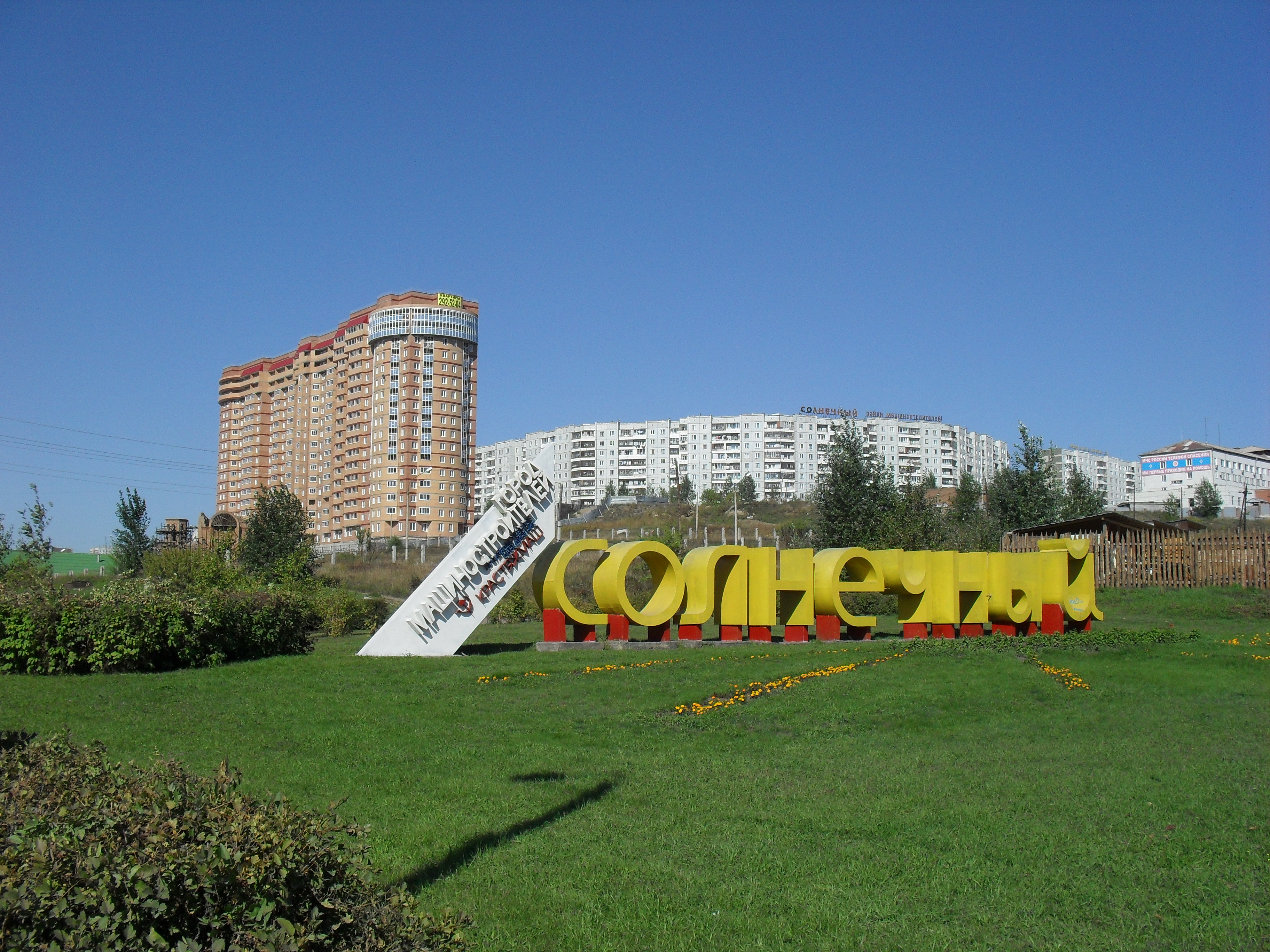 Стела на въезде в микрорайон "Солнечный", Красноярск